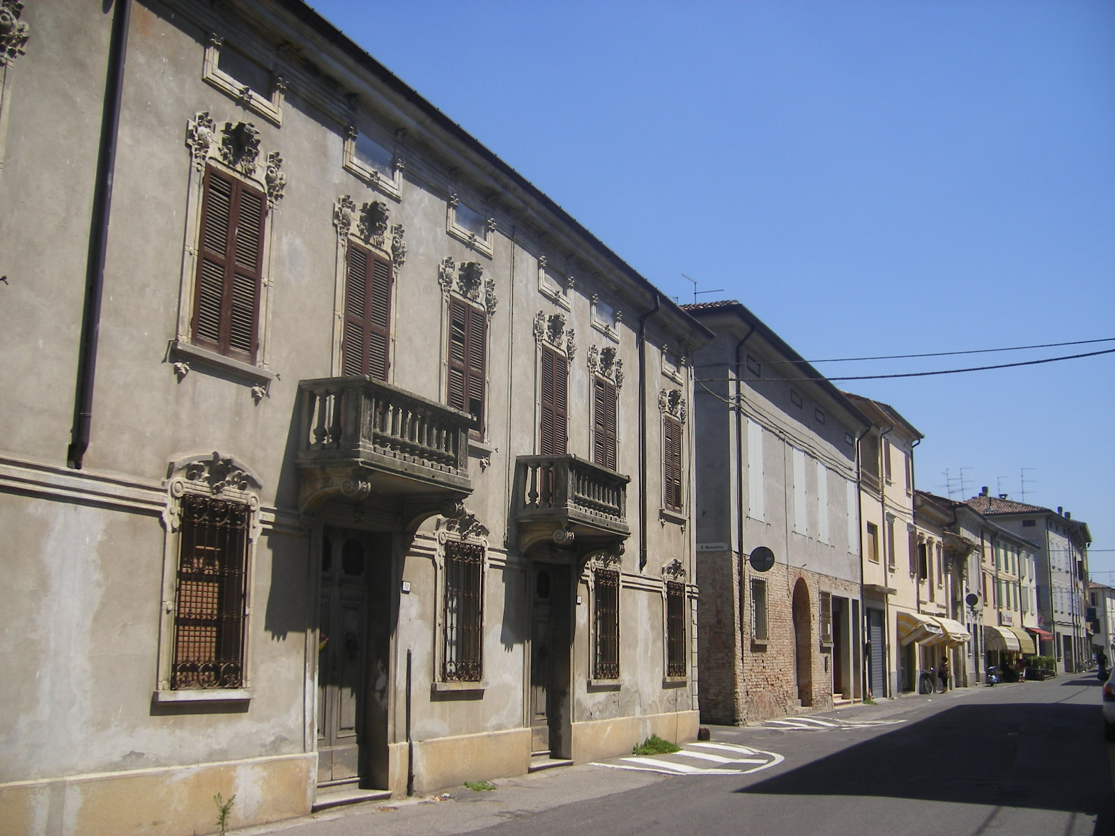 Brescello